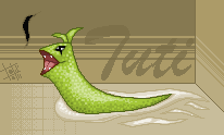 Pixel art imagen